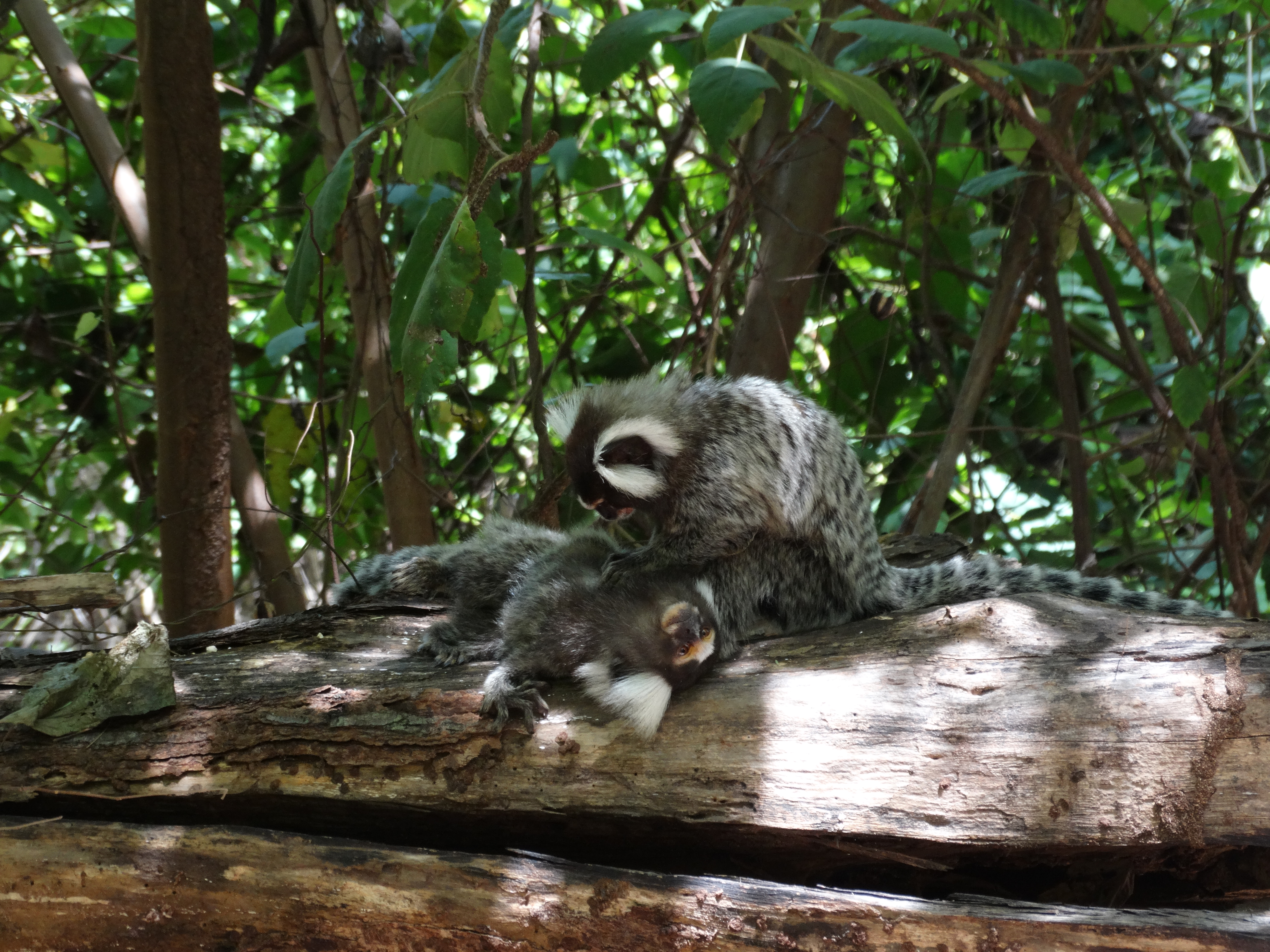 O Grumin é comum entre primatas, eles cuidam da higiene pessoal do grupo